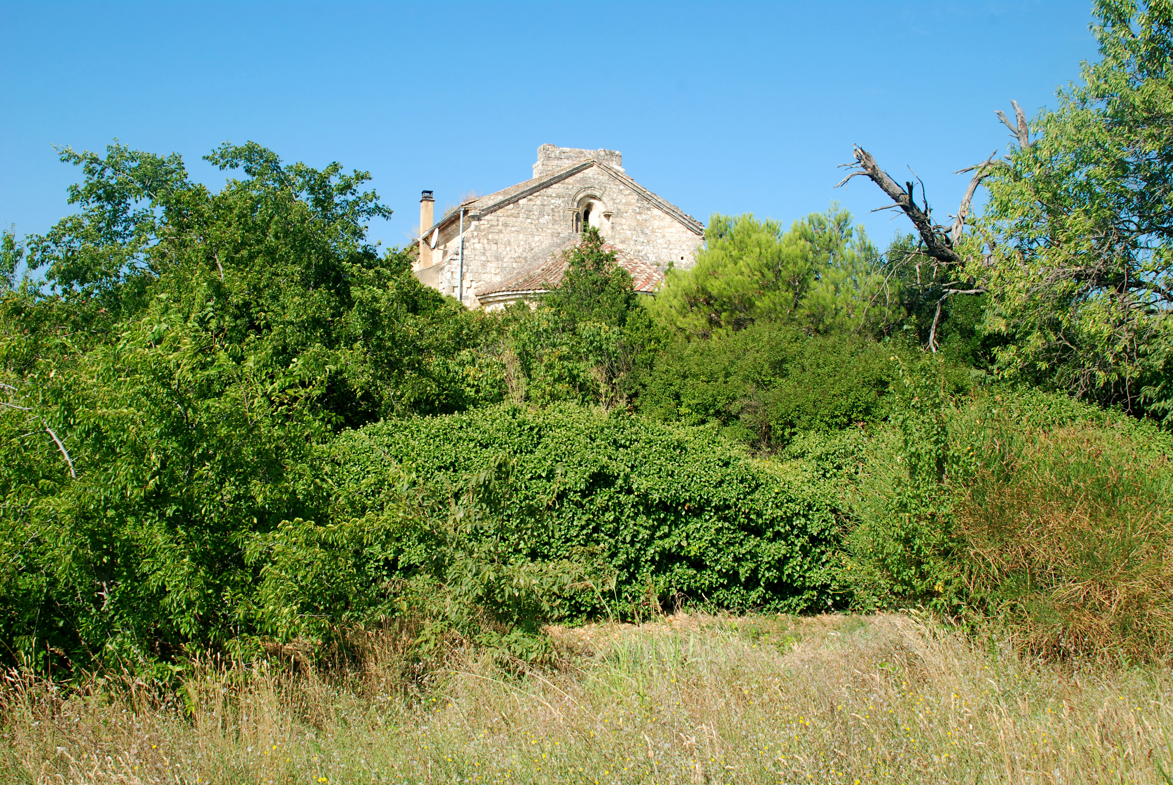 France - Gard - Bagnols-sur-Cèze - Chapelle Saint-Martin-de-Saduran